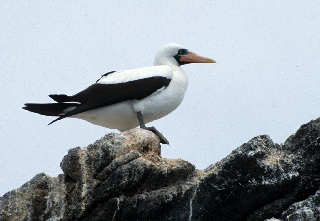 Nazca Booby, Sula granti, Sulidae - Galápagos Islands, Ecuador